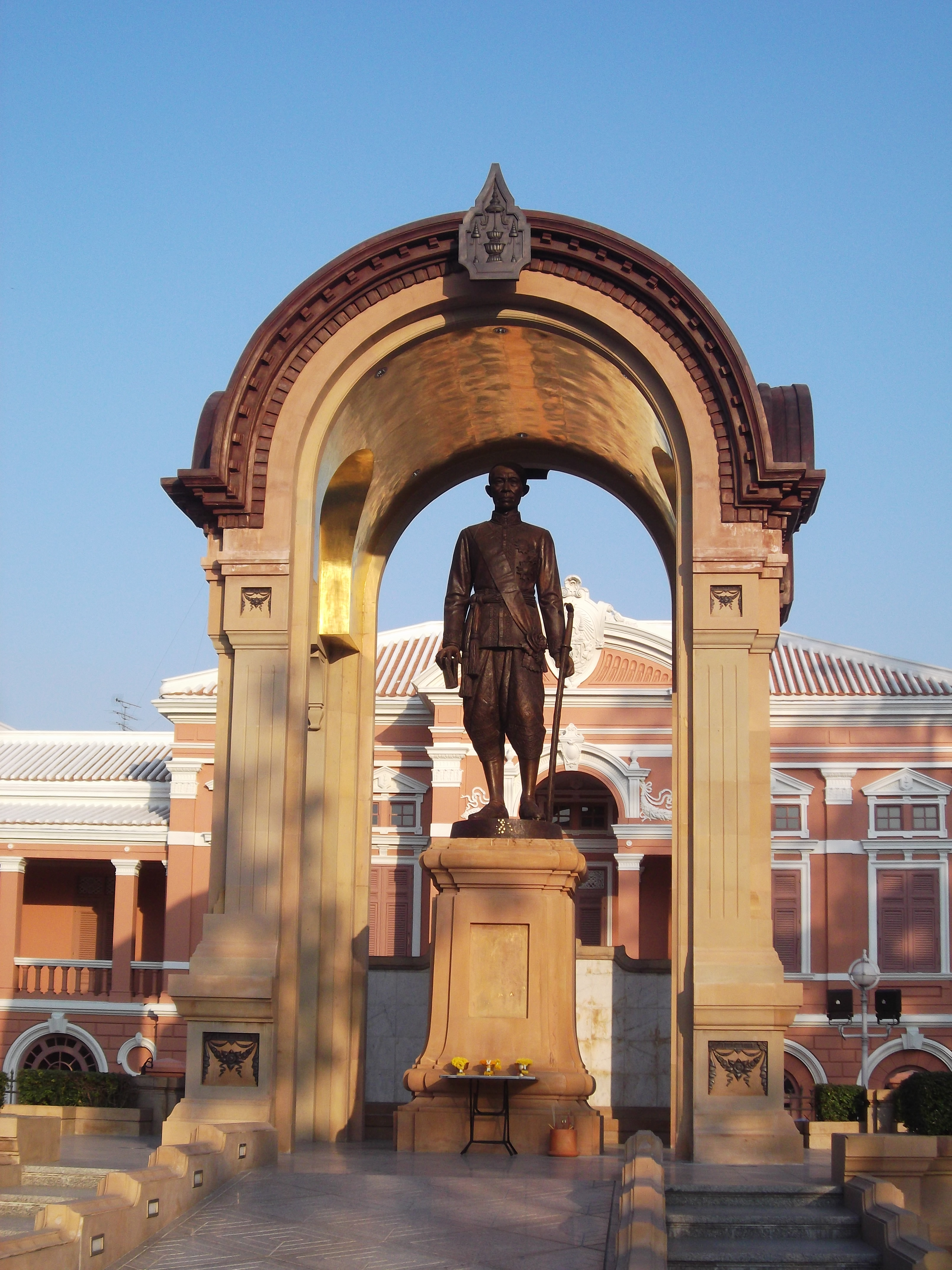 พระราชวังสราญรมย์(กระทรวงการต่างประเทศเดิม)